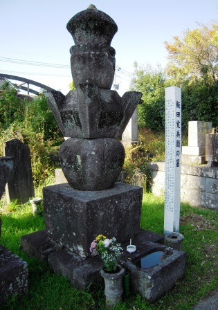 熊本市の阿弥陀寺にある飯田覚兵衛の墓（供養塔）